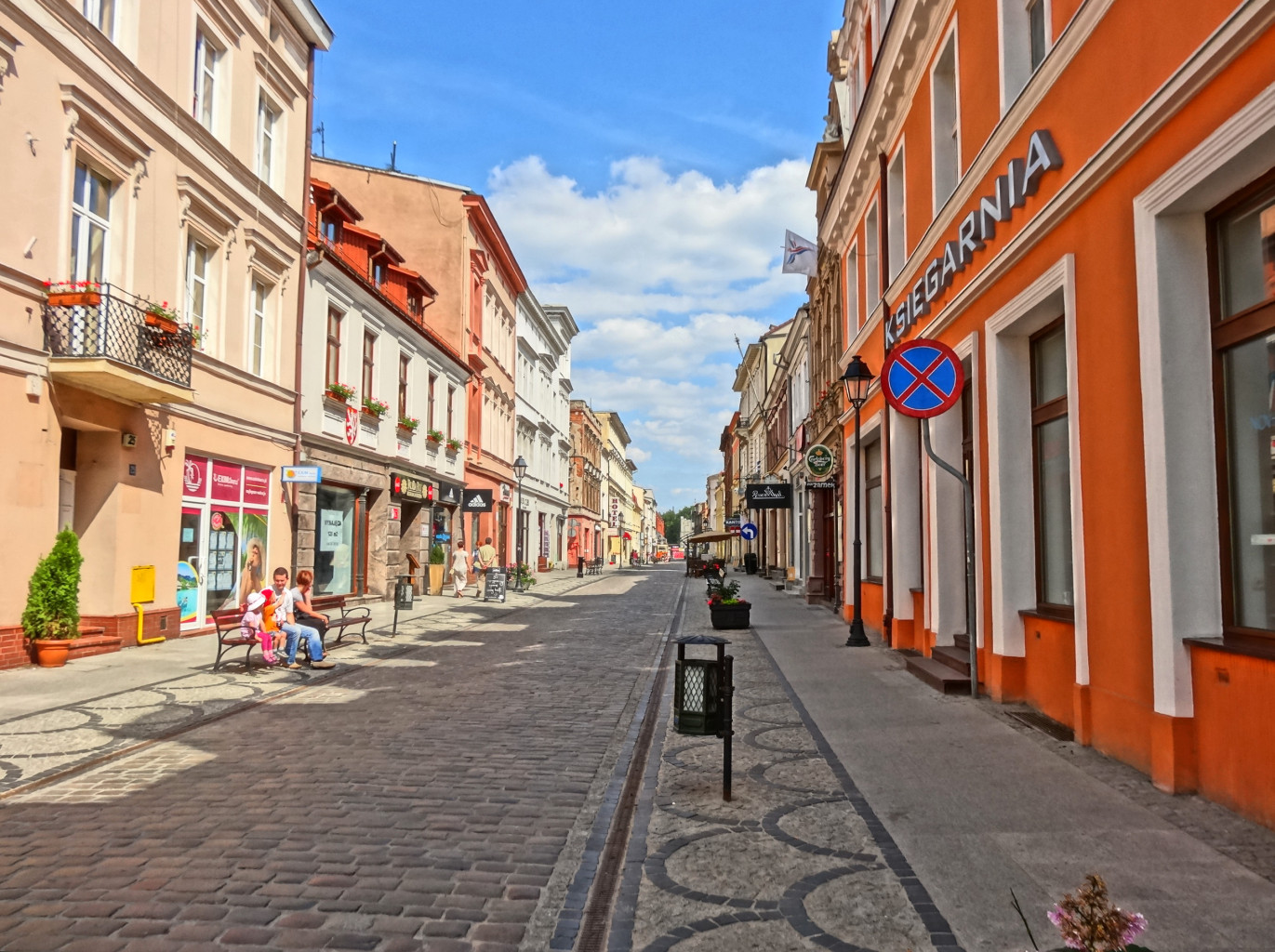 Ulica Długa na Starym Mieście w Bydgoszczy